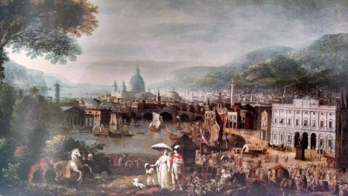 Capricho de Londres con el puerto, el Banco de Inglaterra, el Monumento y la catedral de San Pablo